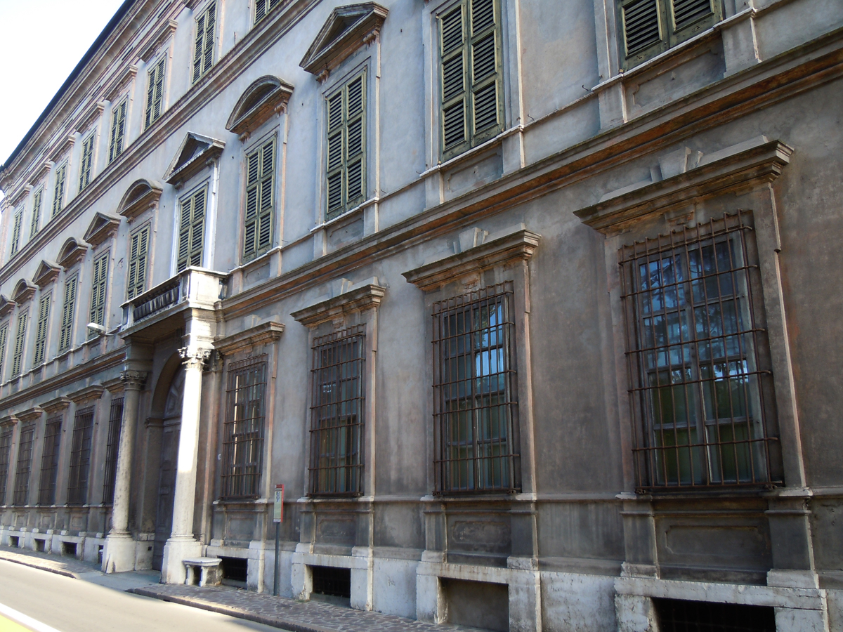 Mantova, via Trento, Palazzo Cavriani.